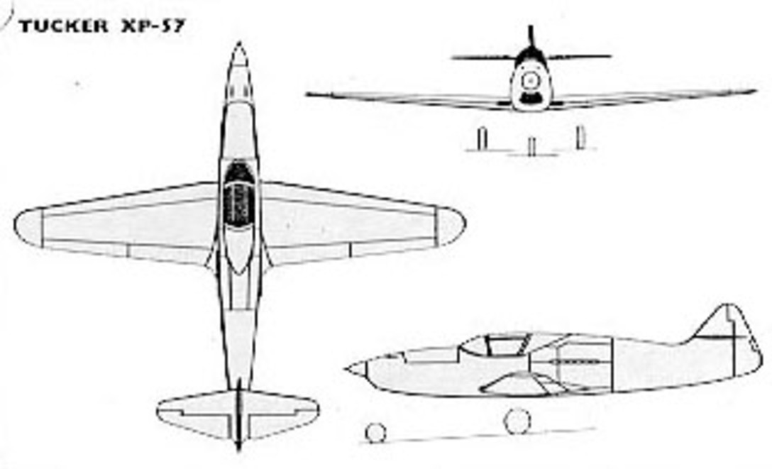 Tucker XP-57